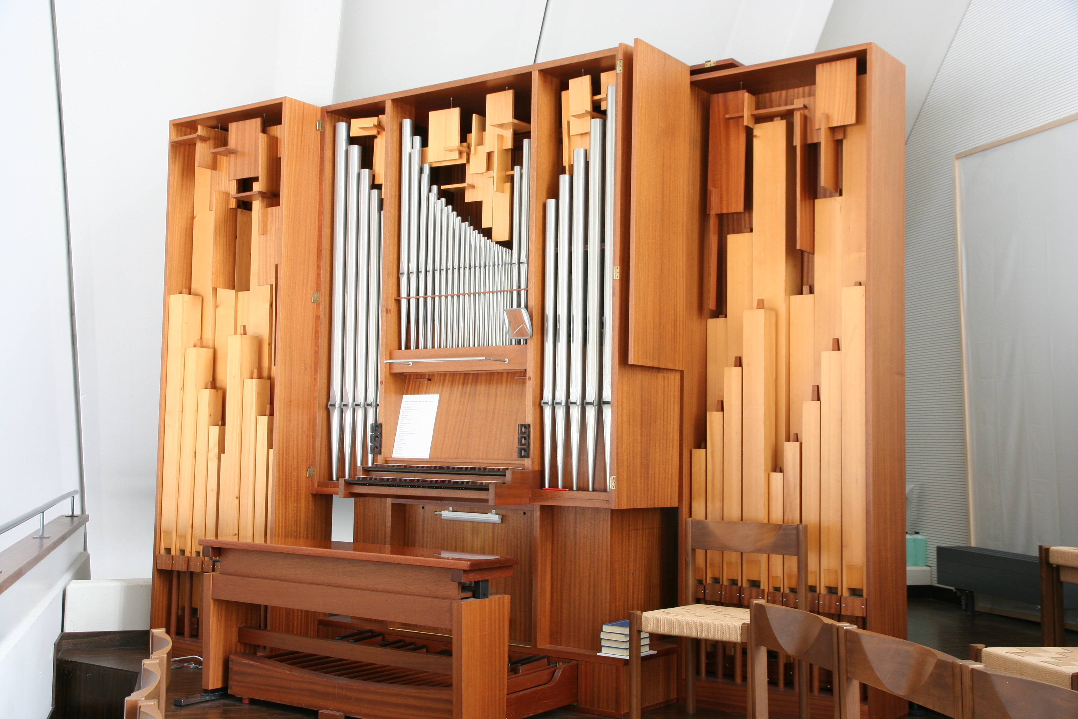 Römisch-katholische Pfarrkirche St. Franziskus Bassersdorf